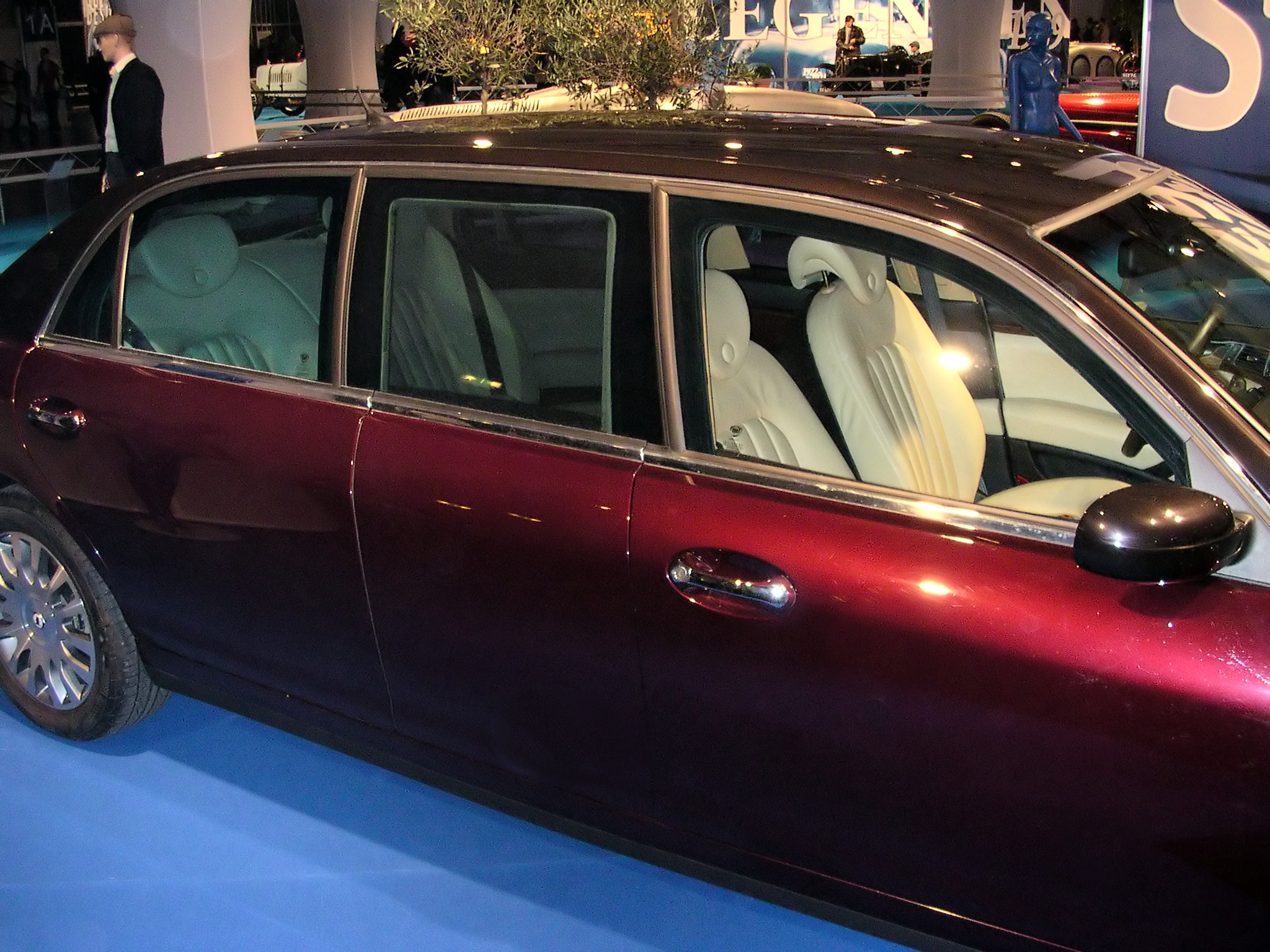 Lancia Thesis als Stretch-Limousine bei der Essener Motorshow 2004.